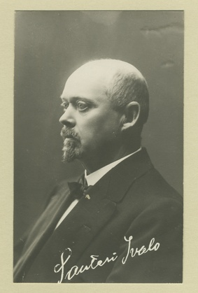 Сантери Ивало (Ингман), финский писатель